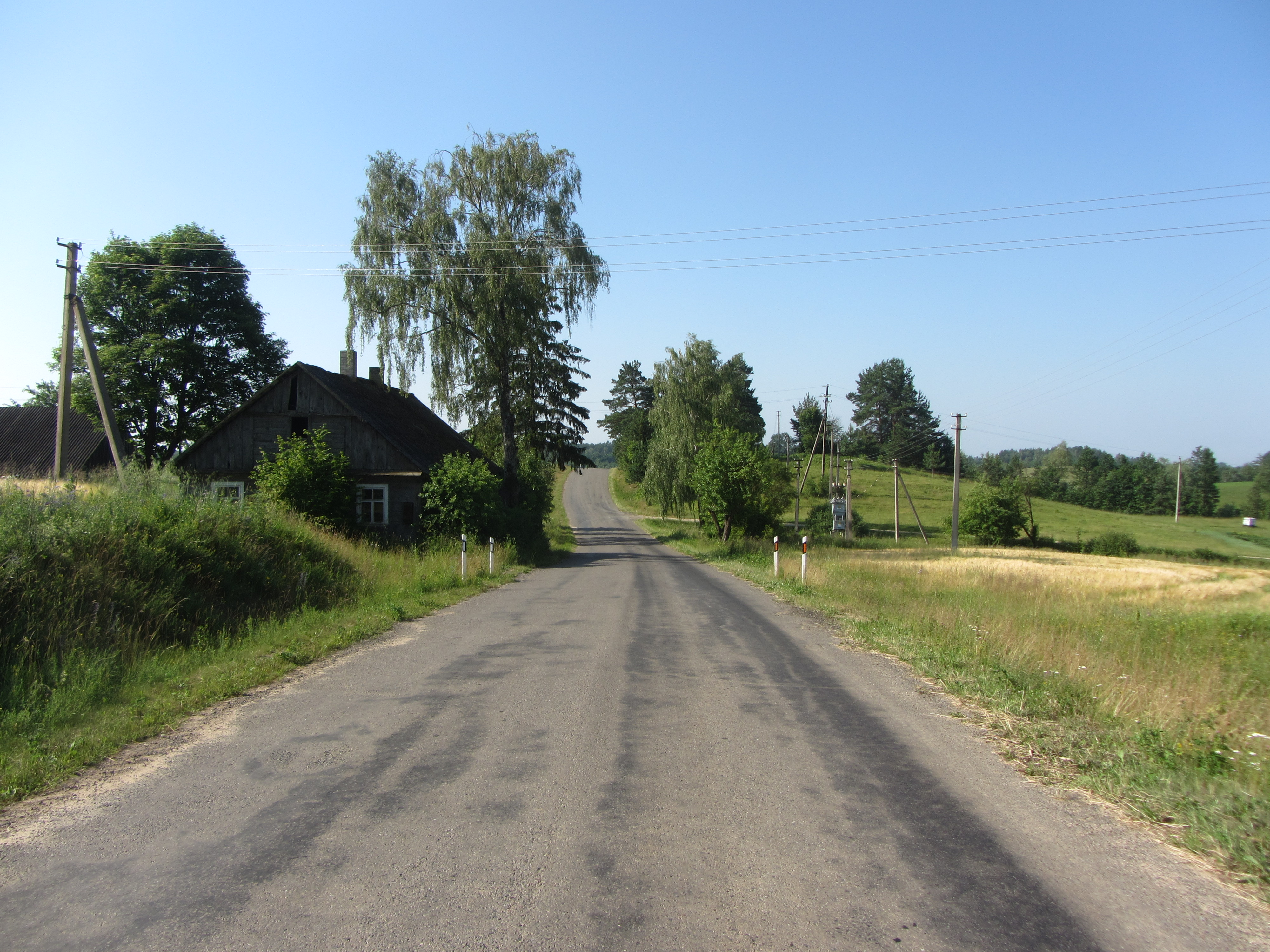 Šlavantų sen., Lithuania